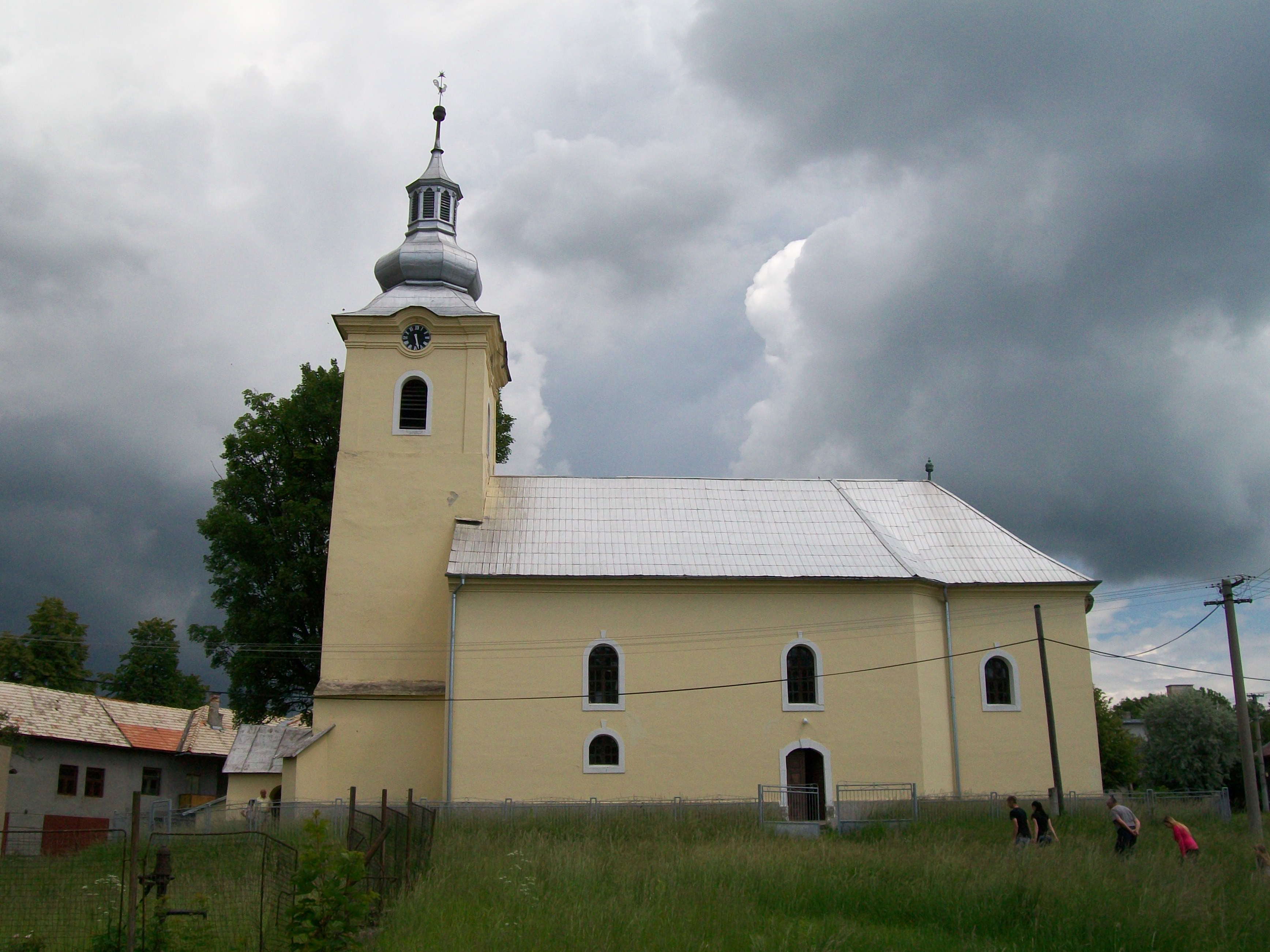 Evanjelický klasicistický kostol z roku 1829. V kostole sa nachádza rokokový oltár z konca 18. storočia.(kultúrna pamiatka)